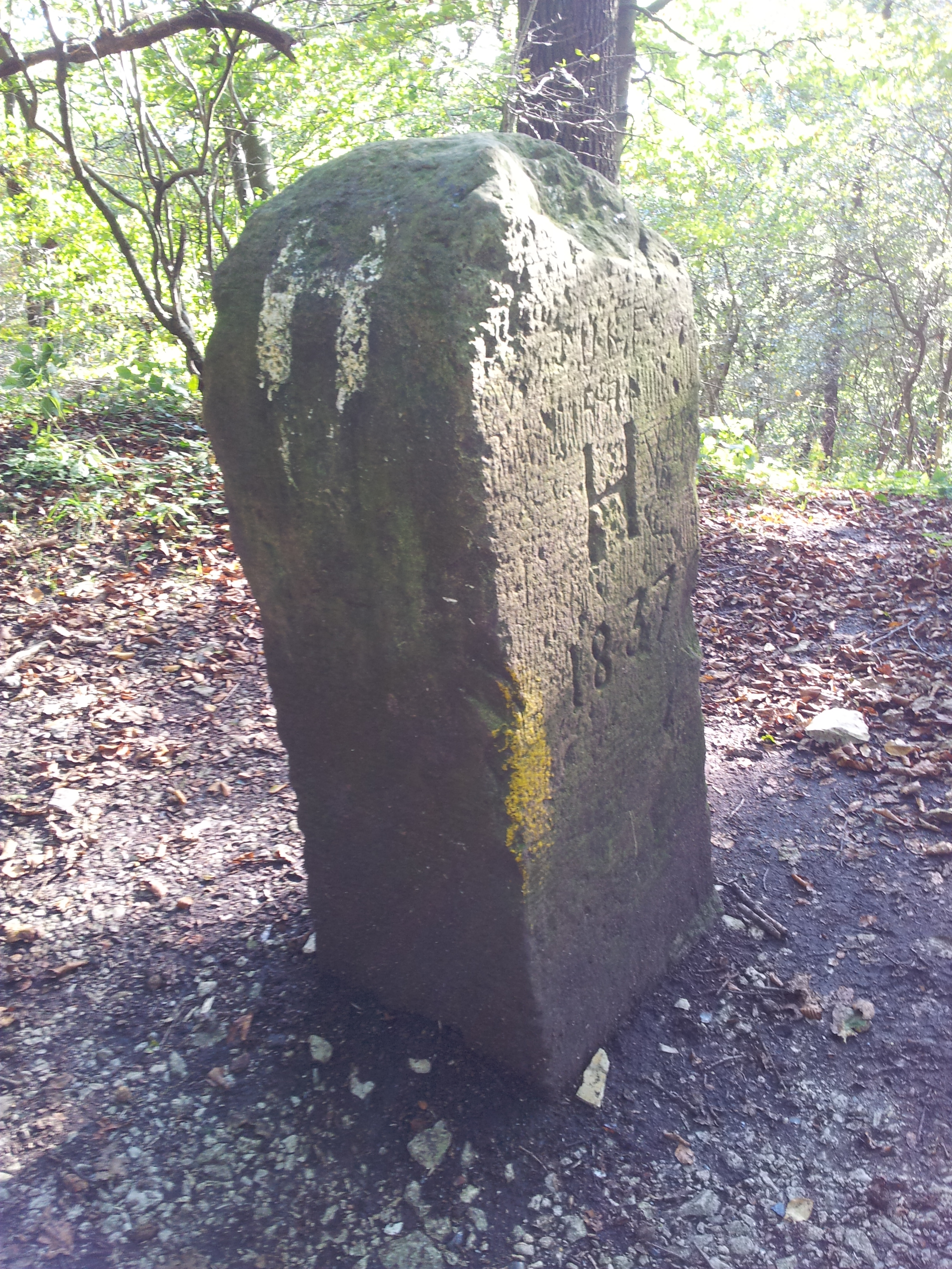 Grenzstein aus dem Jahr 1837 auf dem Hankenüll markierte die Grenze zwischen Preußen und Hannover, heute zwischen Nordrhein-Westfalen und Niedersachsen in Deutschland.